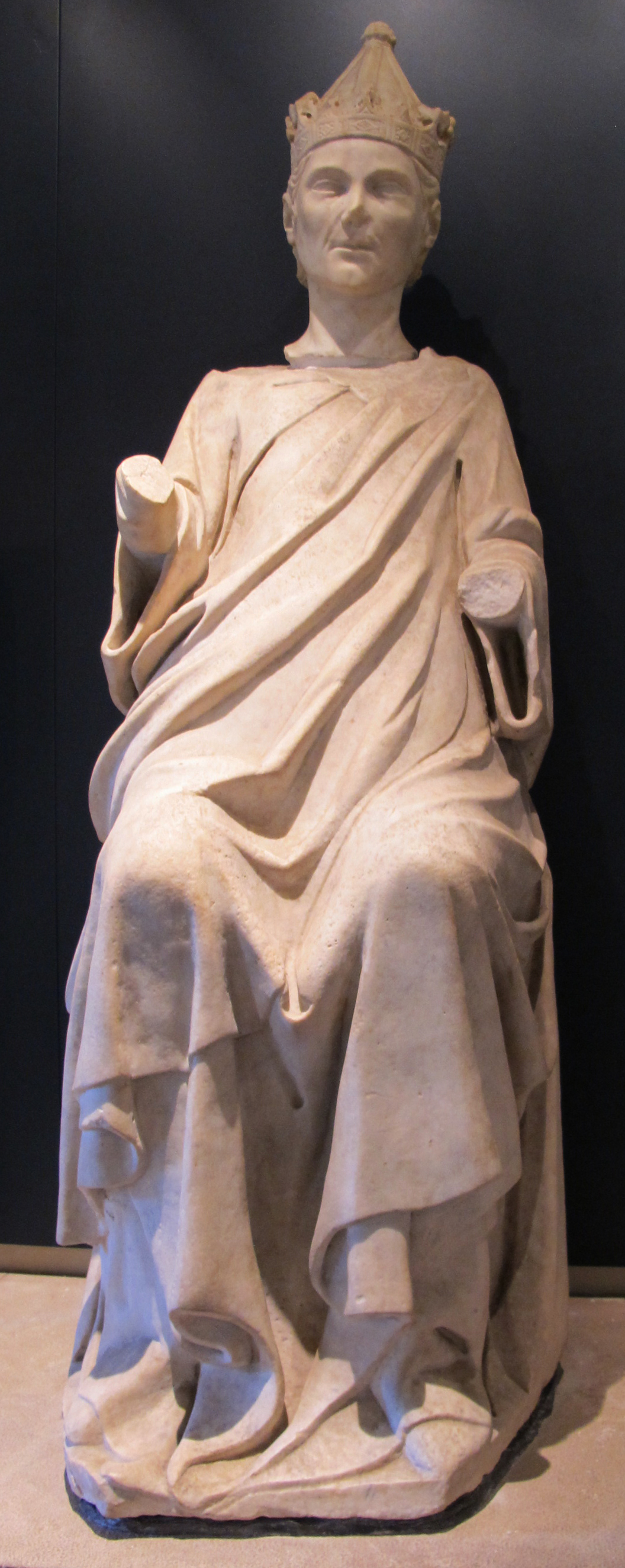 Tino di camaino, statue dal monumento funebre di arrigo VII di lussemburgo, 1313